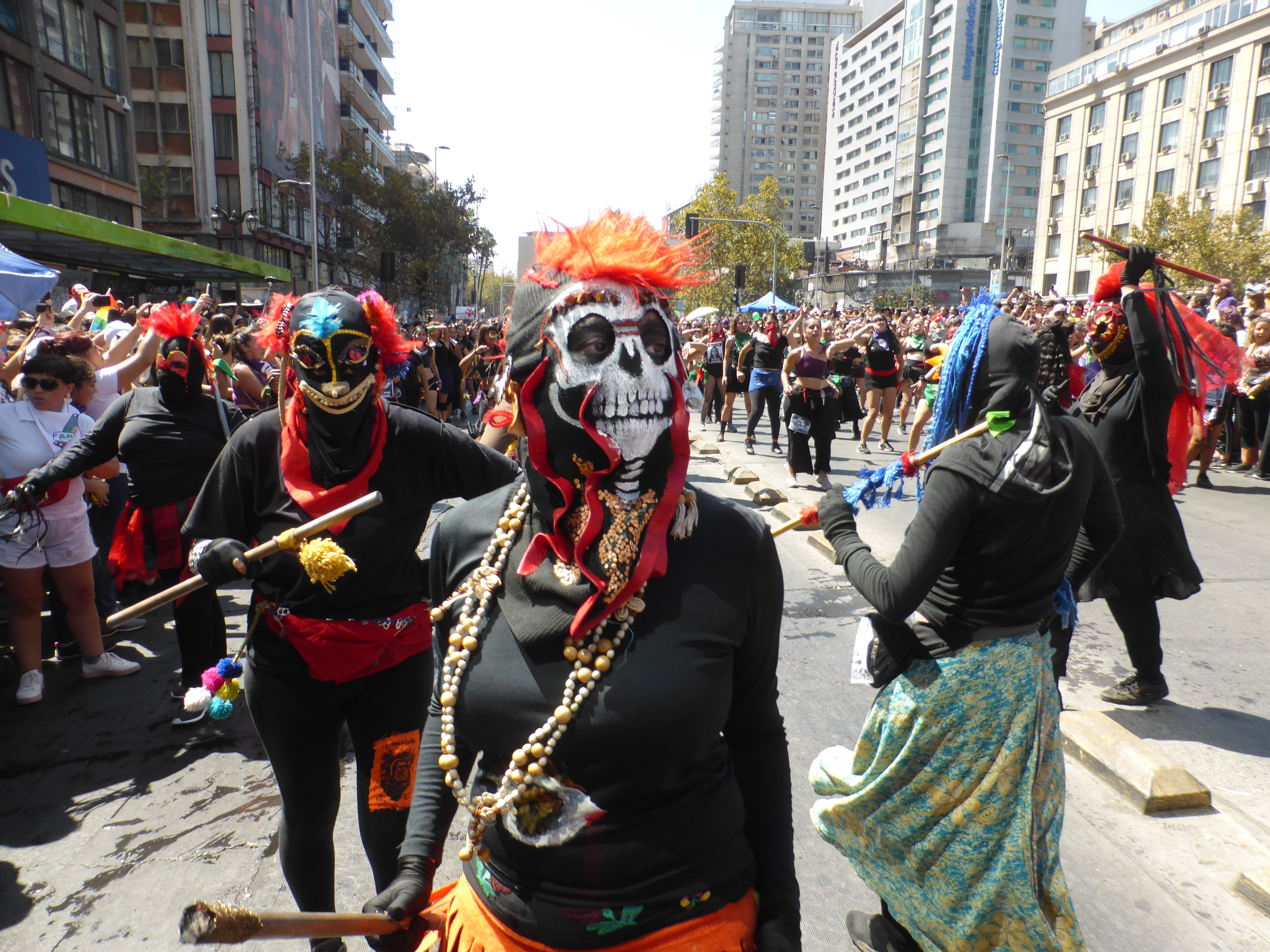 Encargadas de iniciar la marcha feminista. Abriendo paso, apartando espectadores, para poder avanzar. Avenida Alameda, de Santiago de Chile.